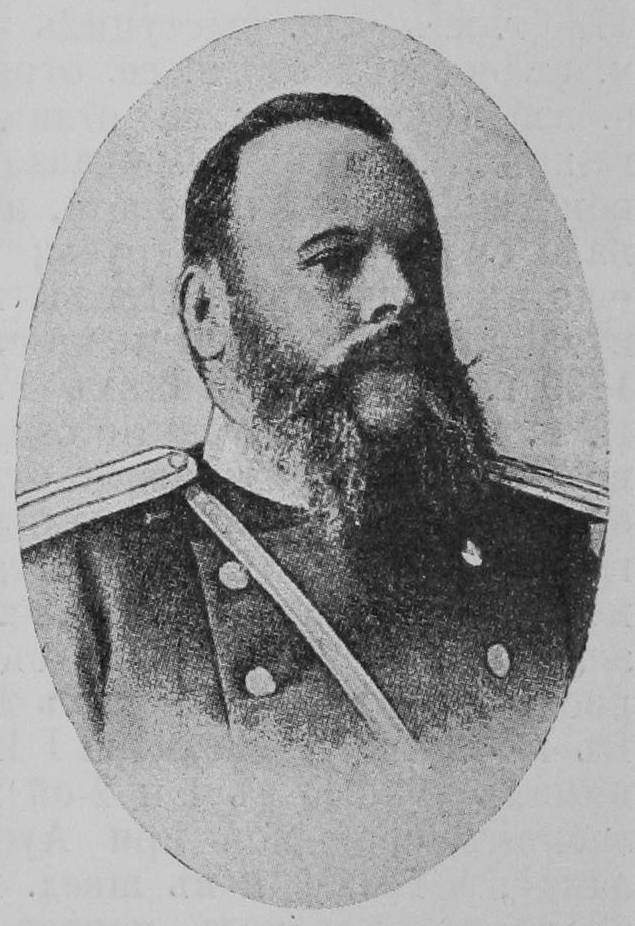 Командир 214 пехотного Мокшанского полка, полковник Павел Петрович Побыванцев. Это изображение было использовано для иллюстрирования статьи «Измаильский, 189-й пехотный, полк» опубликованной в десятом томе «Военной энциклопедии», который был издан книгоиздательским товариществом И. Д. Сытина в 1912—1913 гг. в столице Российской империи городе Санкт-Петербурге.